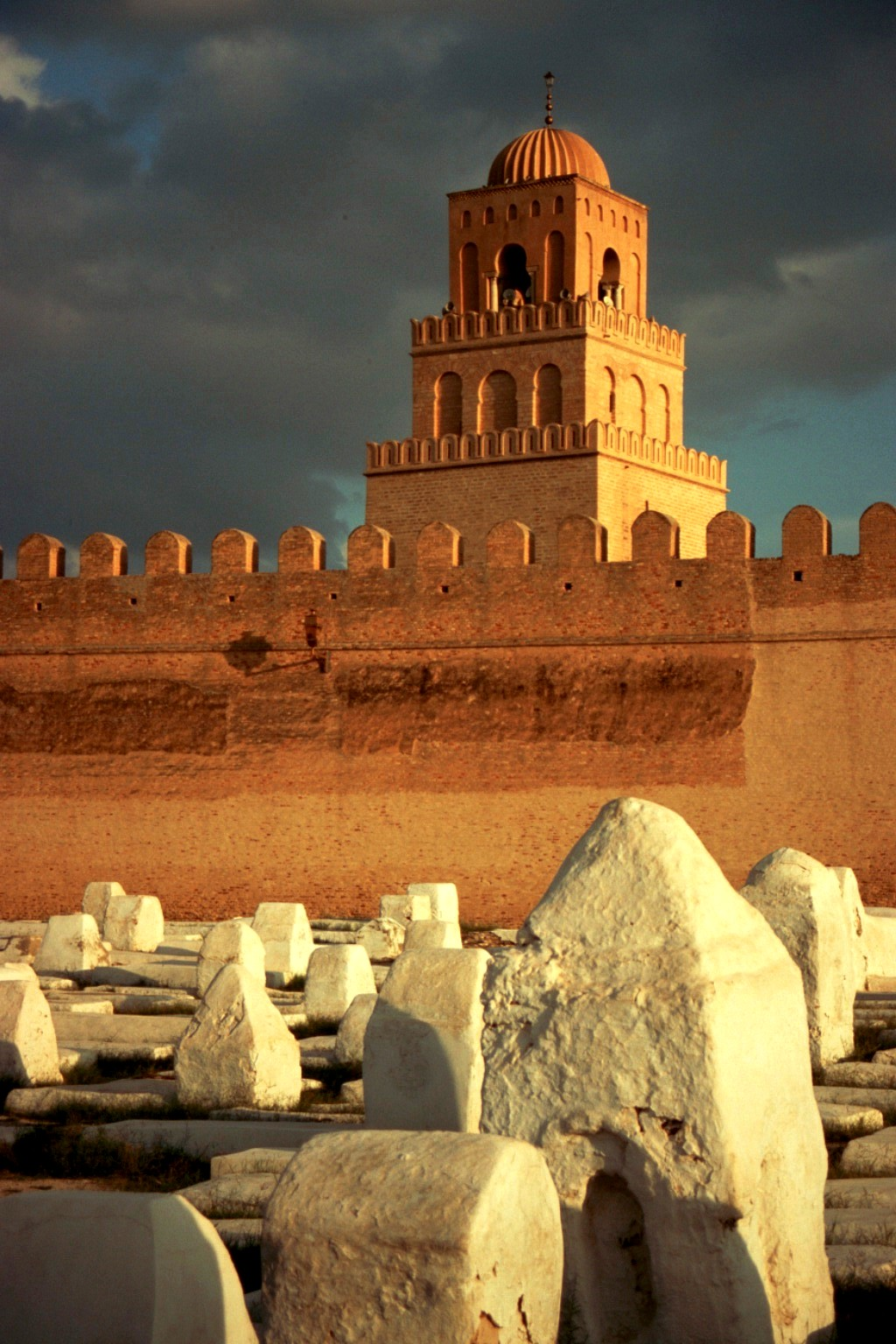 Kairouan, mosquée Okba et cimetière au premier plan Author : utilisateur:Douya